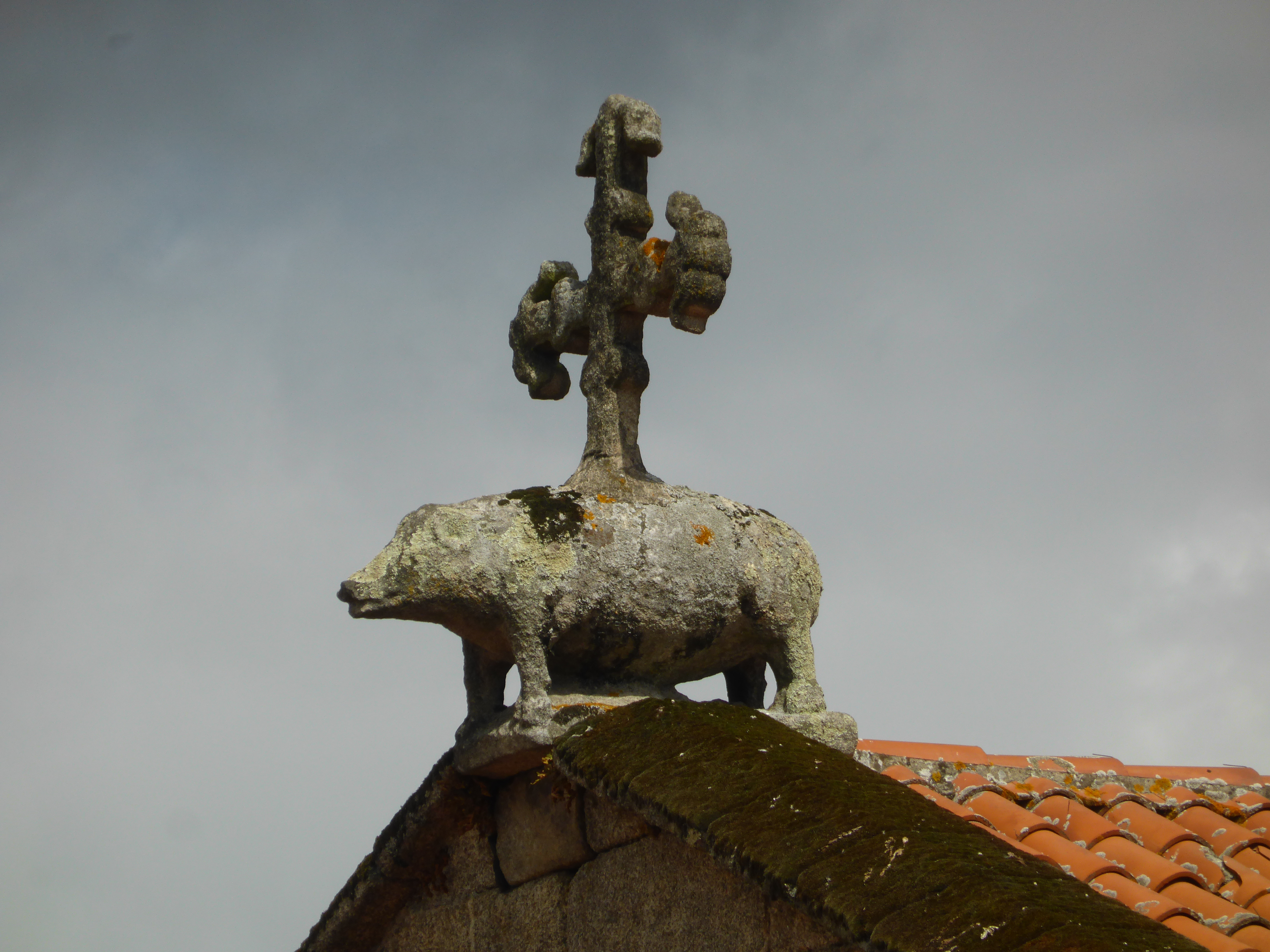 El jabalí recuerda a la familia de los Andrade. El caballero Fernán Pérez de Andrade, en el siglo XIV, mandó reformar o reedificar el monasterio de San Francisco, de Betanzos.